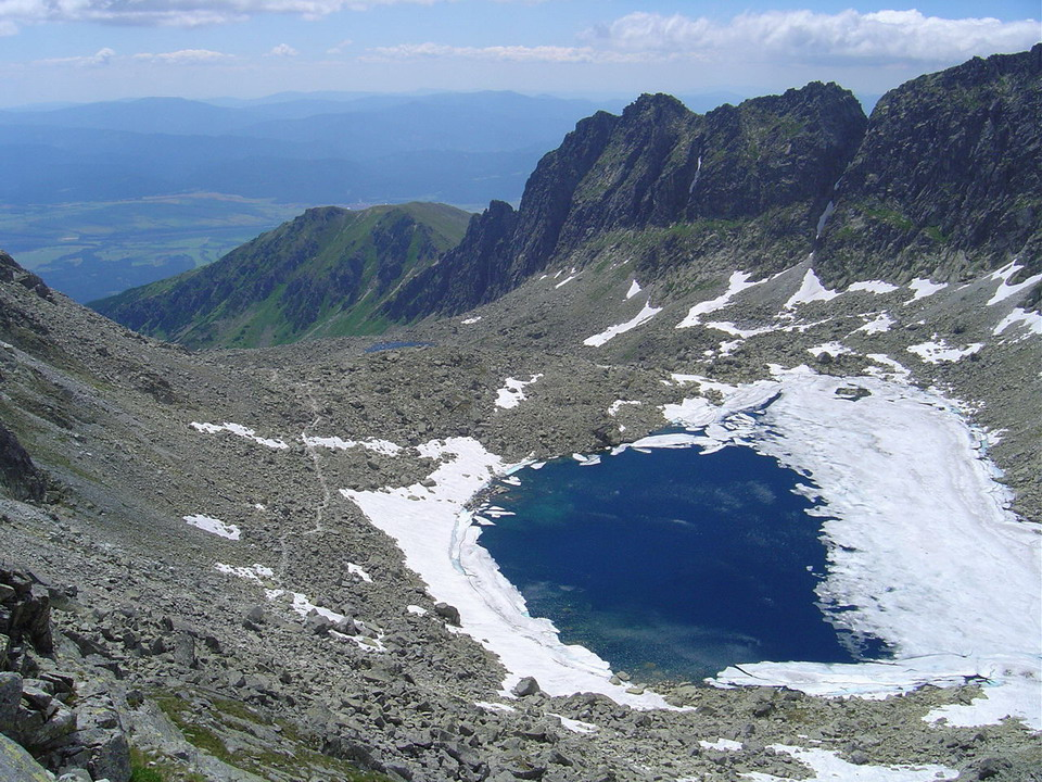 Vysne Wahlenbergovo pleso in Furkotska dolina